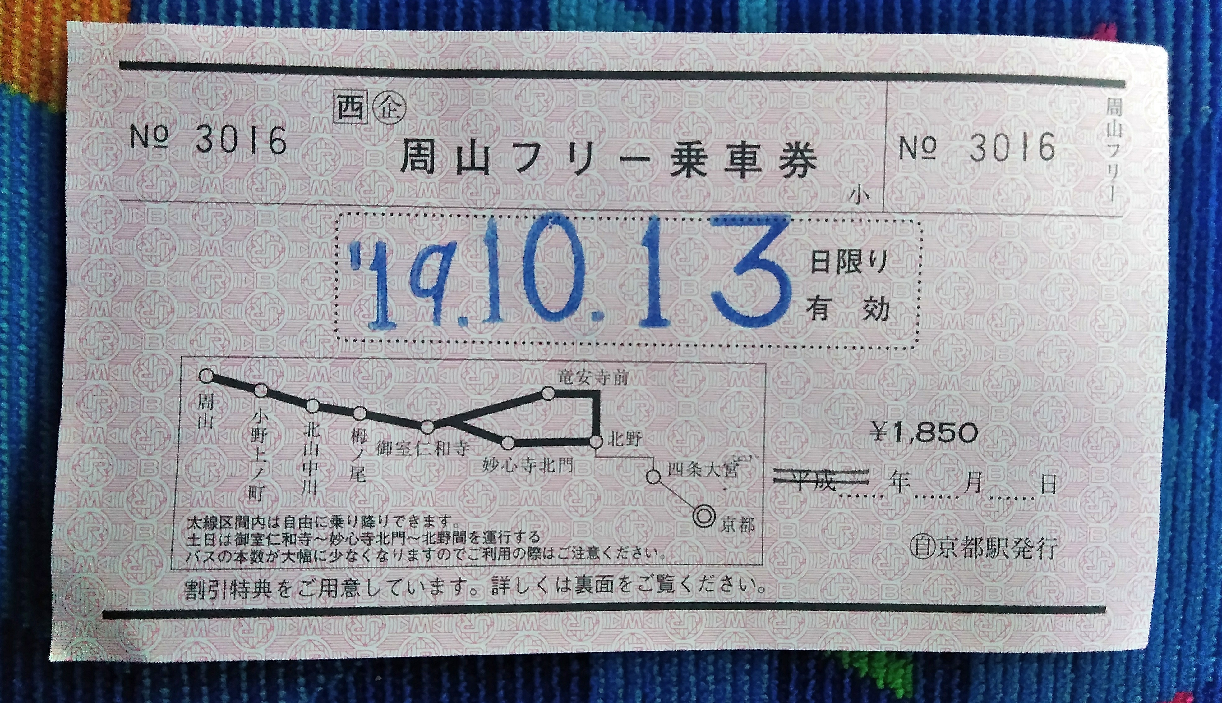 JR西日本バスが発行する高雄・京北線用の周山フリー乗車券